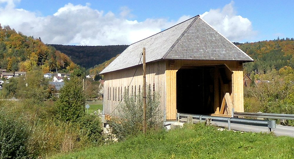 Überdachte Holzbrücke über die Donau in Zimmern, Gemeinde Immendingen